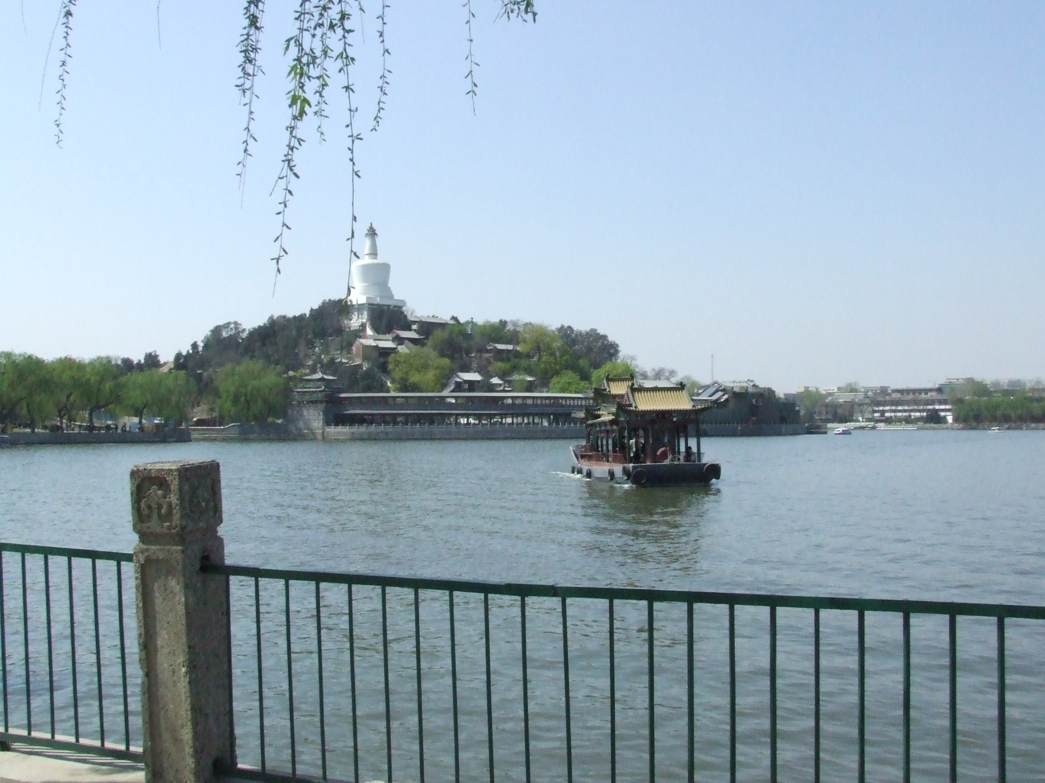 The Beihai Park in Beijing